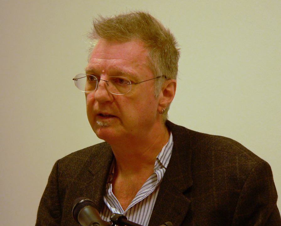 Ulrich Werz bei einem numismatischem Vortrag beim FAN